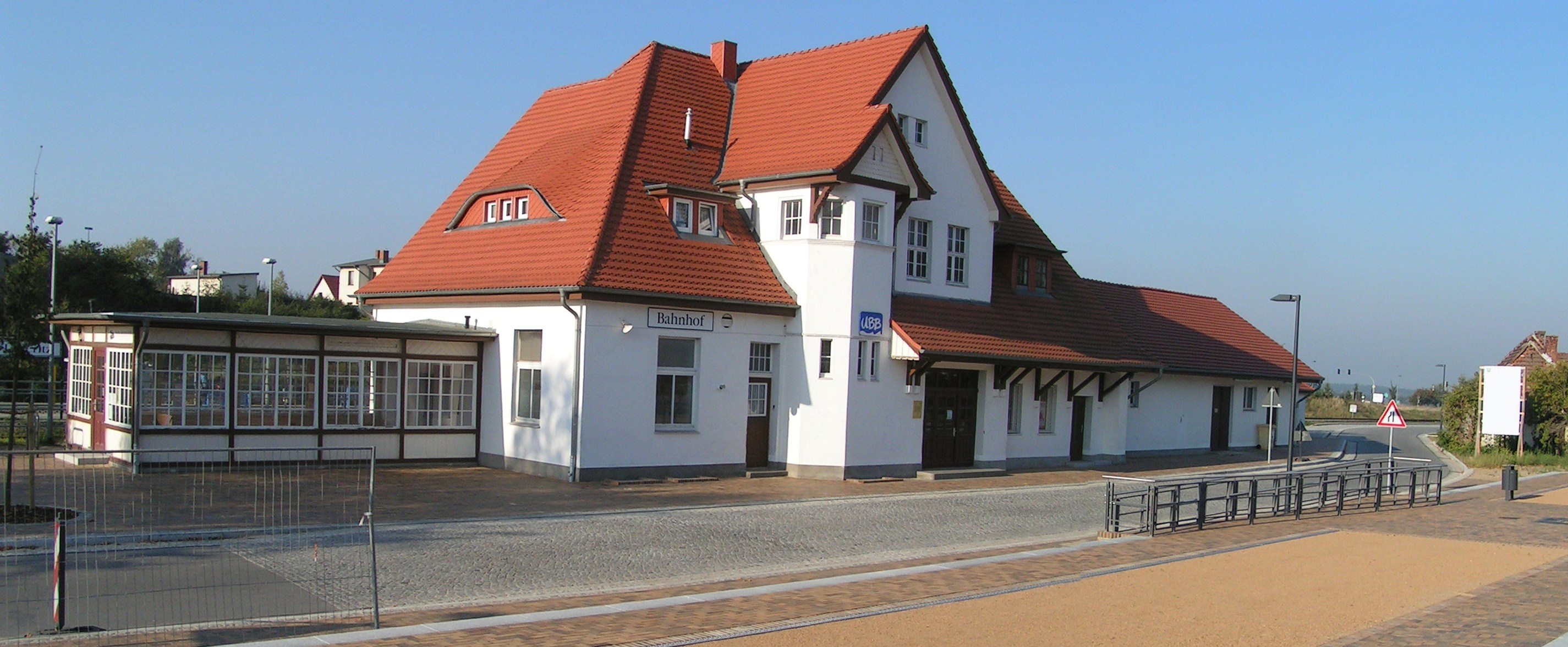 Bahnhof in Ückeritz auf Usedom, Landkreis Vorpommern-Greifswald